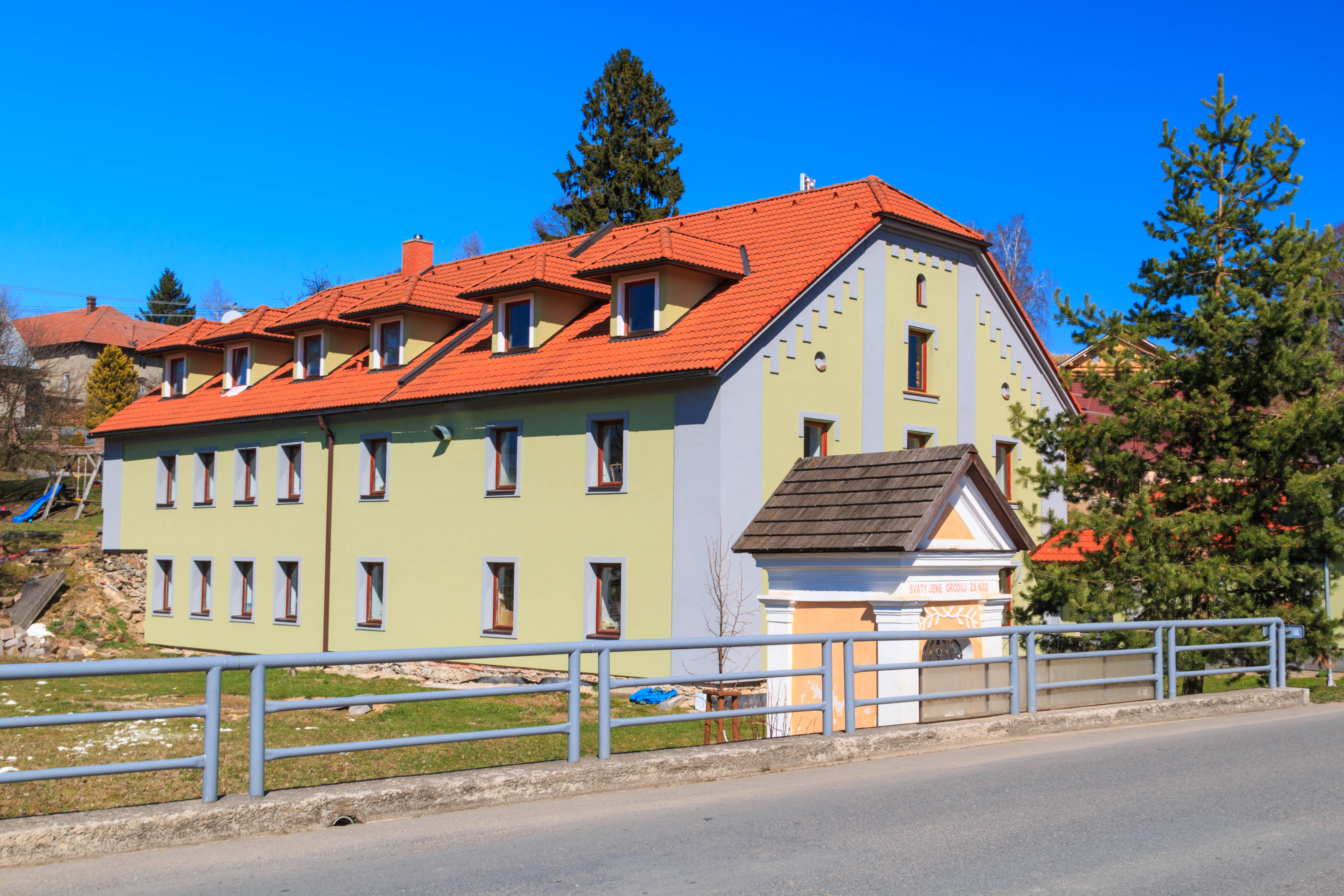 Kamenec u Poličky - dům čp. 59